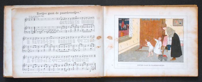 Van Sinterklaas en Pieterbaas, twaalf Sinterklaasliedjes